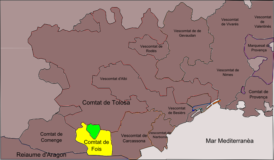 Territòris dau còmte de Fois : - coma vassau dau rèi d'Aragon (jaune). - coma vassau dau còmte de Tolosa (verd).